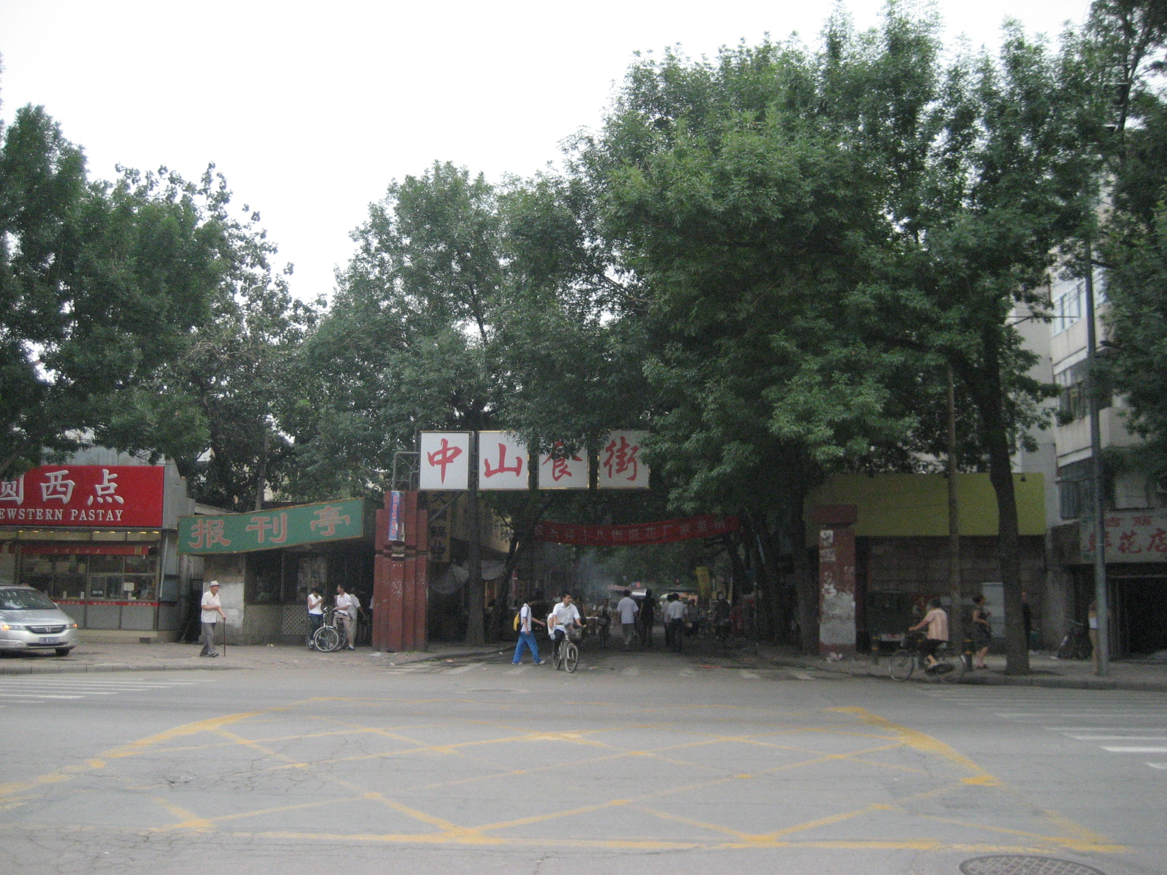 原天津勸業會場大門